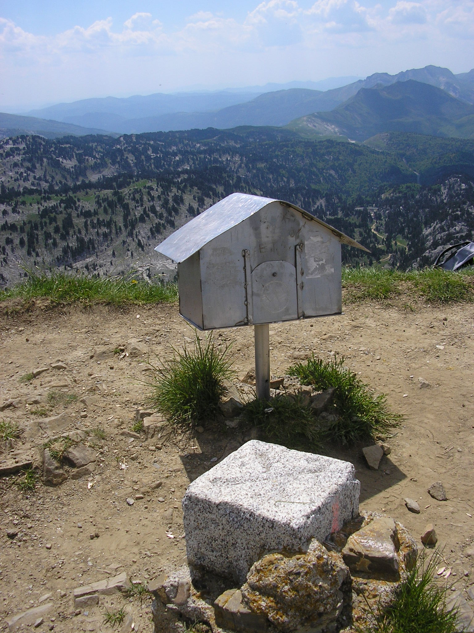 Самодельный домик и столбик, обозначающий границу Франции и Испании, установленные на вершине пика Арлас (Пиренеи)